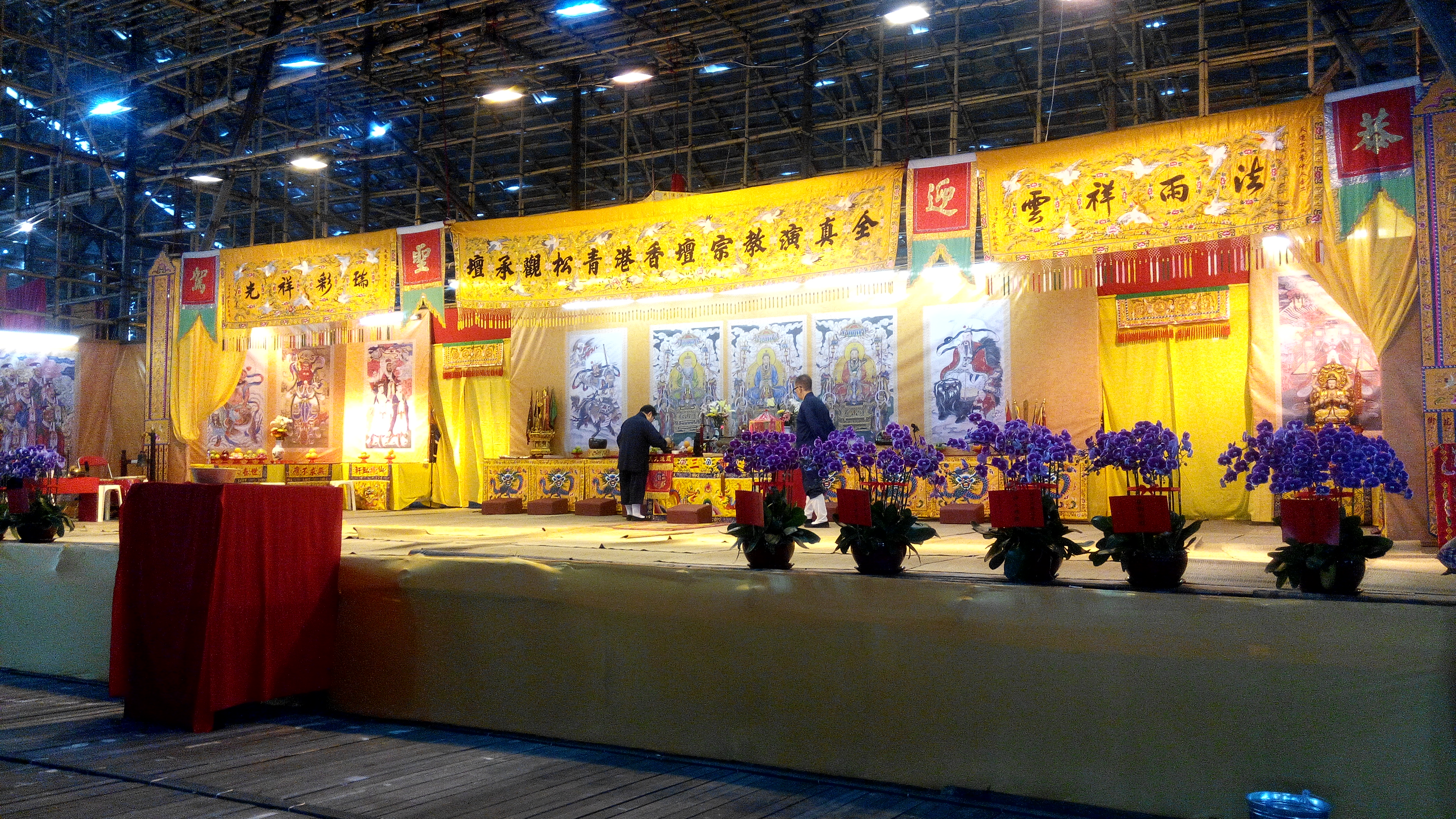 中文（香港）: 錦田太平清醮的喃嘸棚